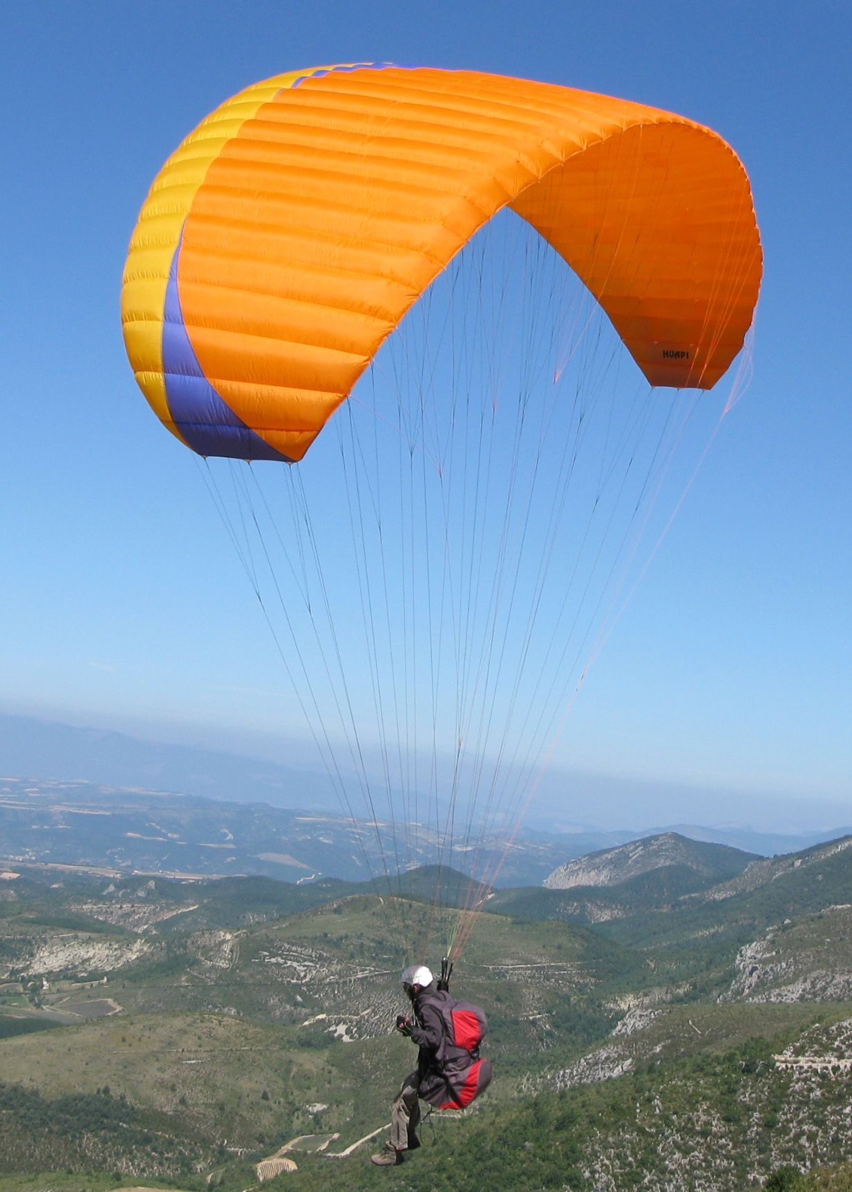 Décollage depuis le site de Montdenier (04025)